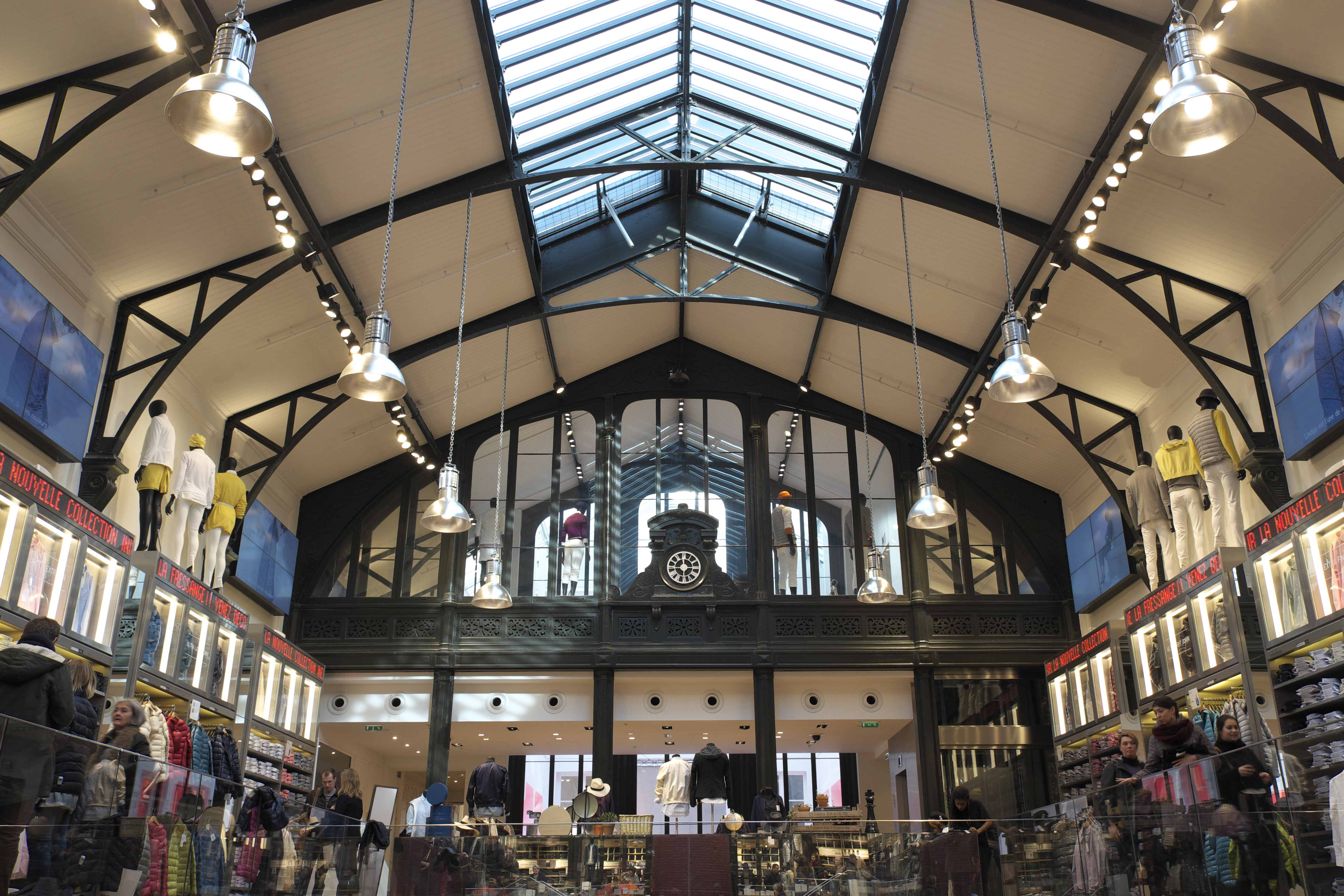 Ehemaliges Gebäude der Société des Cendres in der Rue des Francs-Bourgeois Nr. 39 im 4. Arrondissement in Paris, seit 2014 ist hier ein Modegeschäft eingerichtet